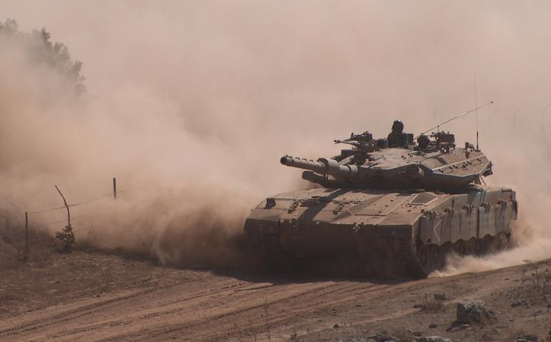 Merkava MkIII Baz tank of Armoured Brigade 188 טנק מרכבה סימן 3 ב"ז בתרגיל חטיבת של עוצבת ברק - חטיבה 188